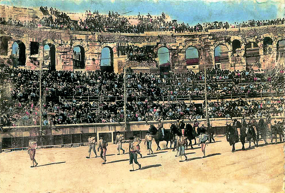 Entrée du quadrillo lors d'une Feria de Nîmes au début du XXe siècle